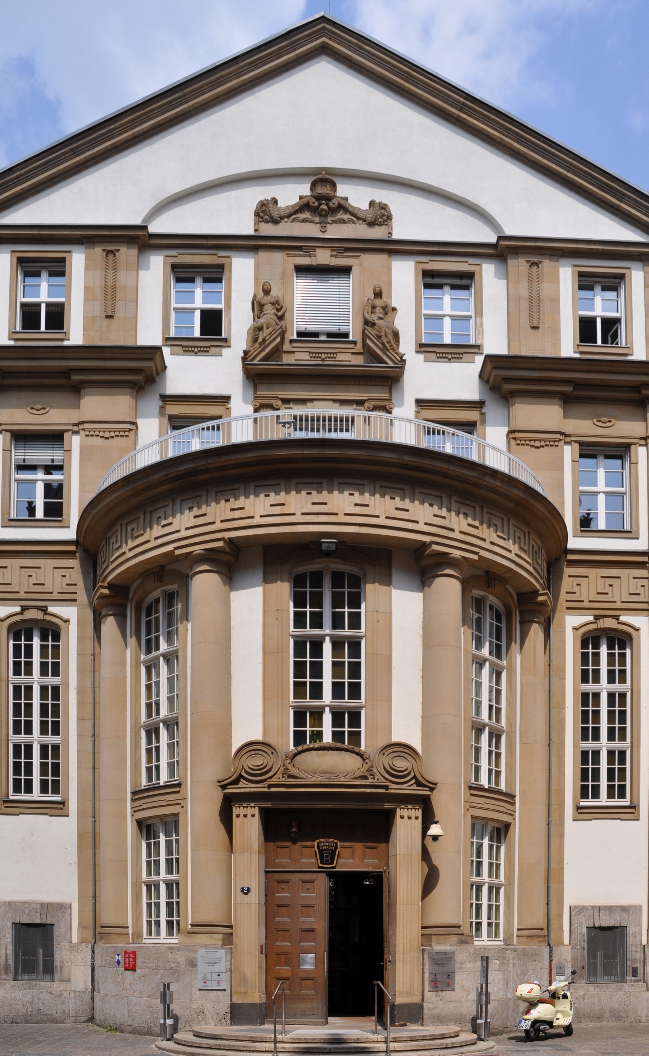 Amtsgericht und Landgericht Frankfurt am Main. Eingang des Dienstgebäudes B.